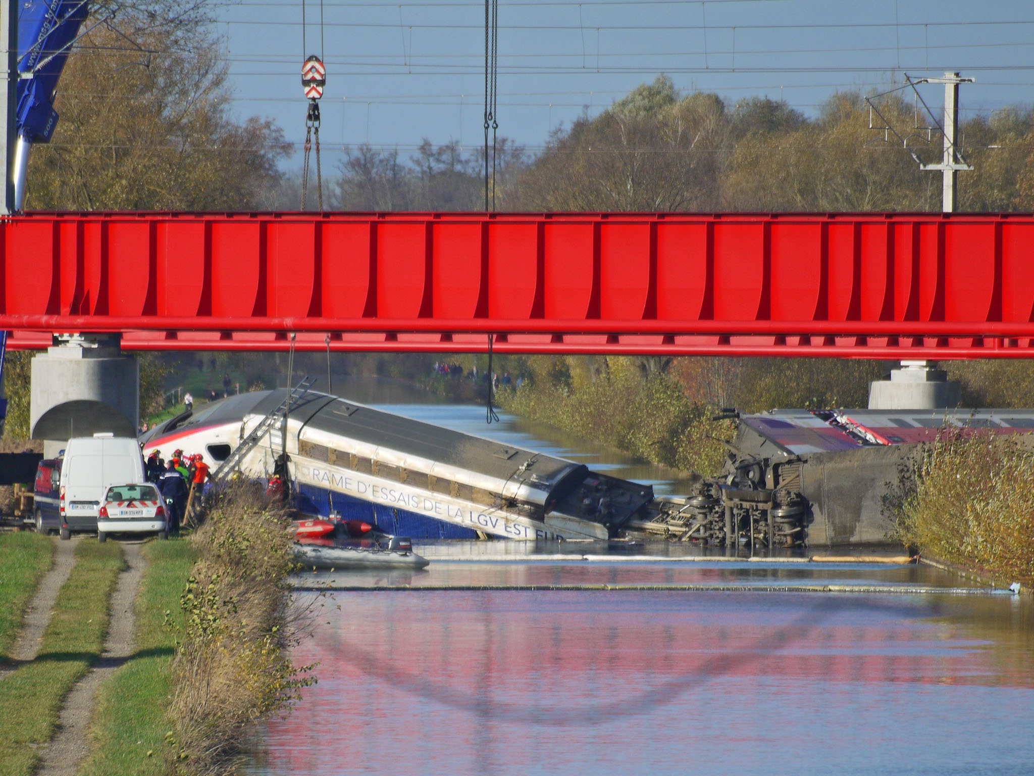 Motrice TGV Dasye 29787 et voitures 291744 et 292744 partiellement immergées dans la canal de la Marne au Rhin après le déraillement d'Eckwersheim.